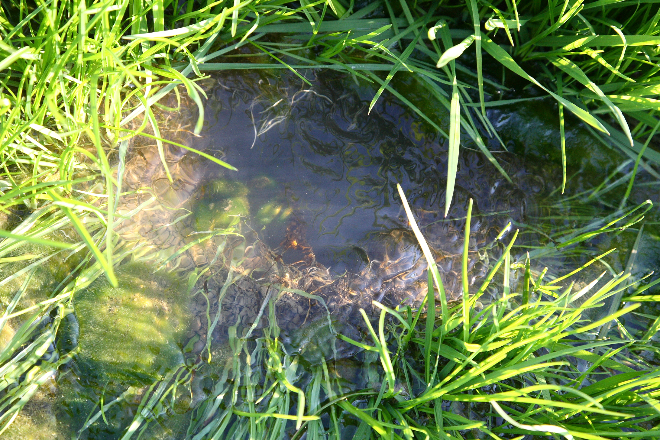 Quellschwemmkegel im Mental bei Henglarn, Lichtenau (Westfalen)